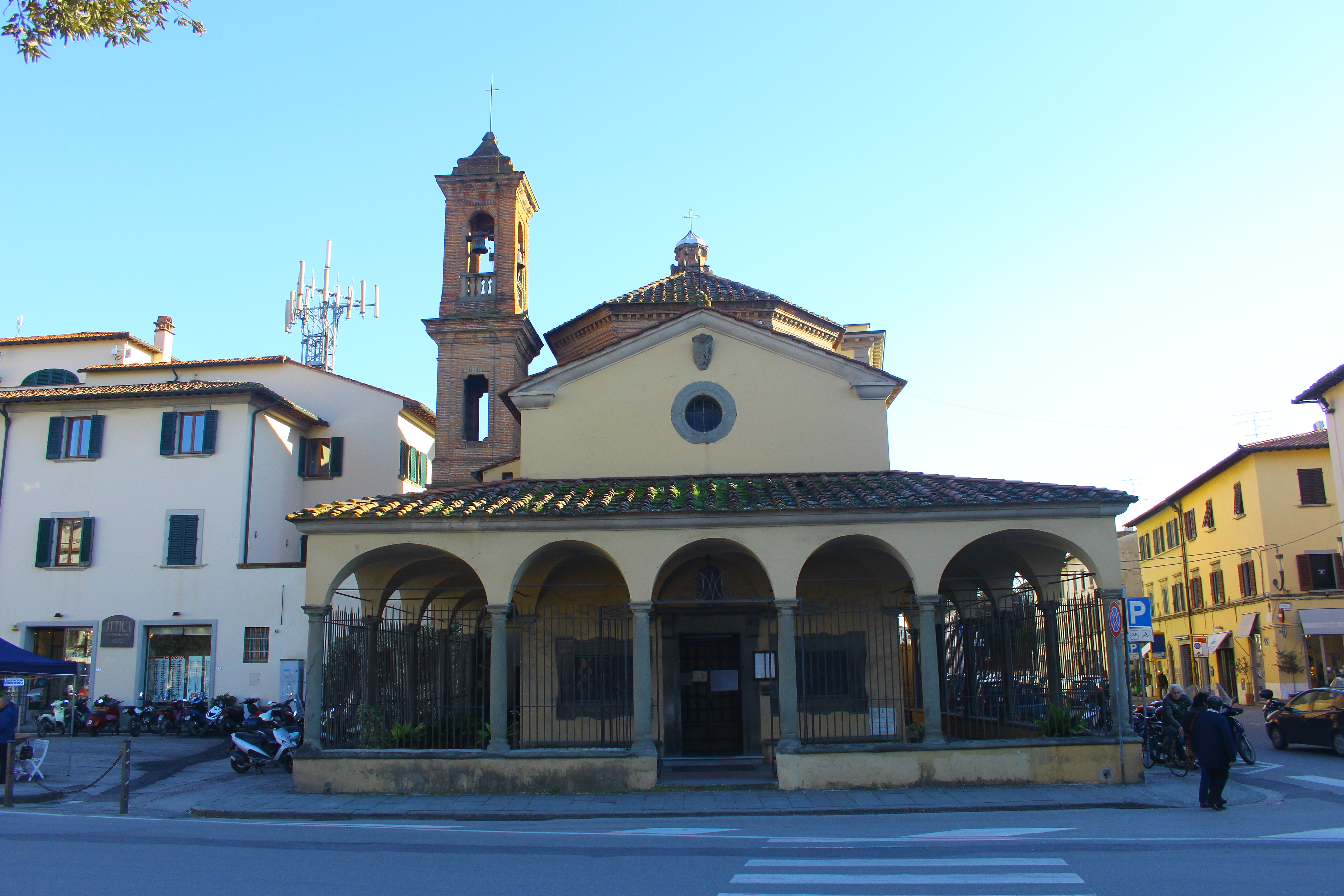 Collegiata della Madonna del Pozzo in Empoli